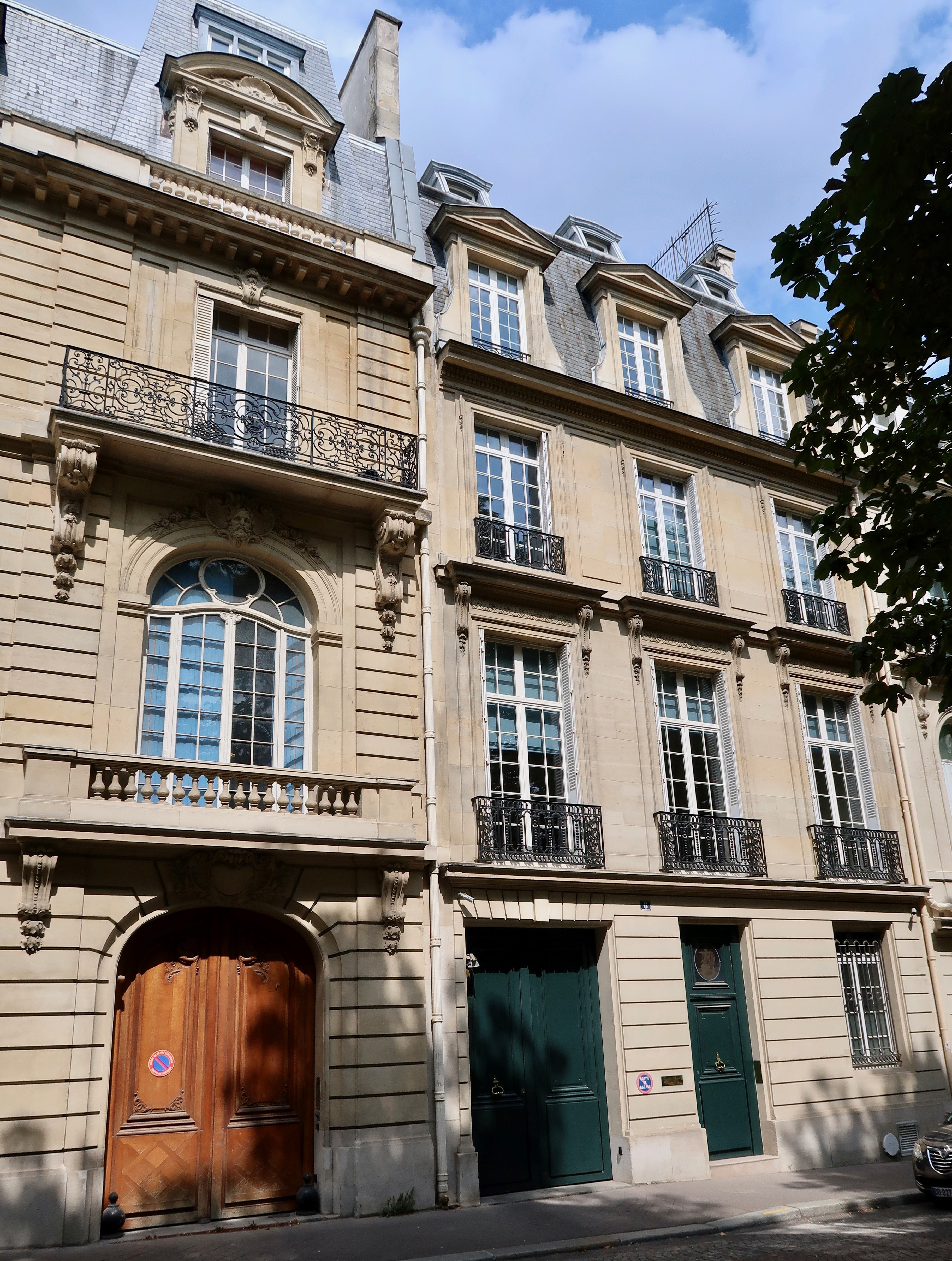 6-8 place des États-Unis (Paris, 16e).